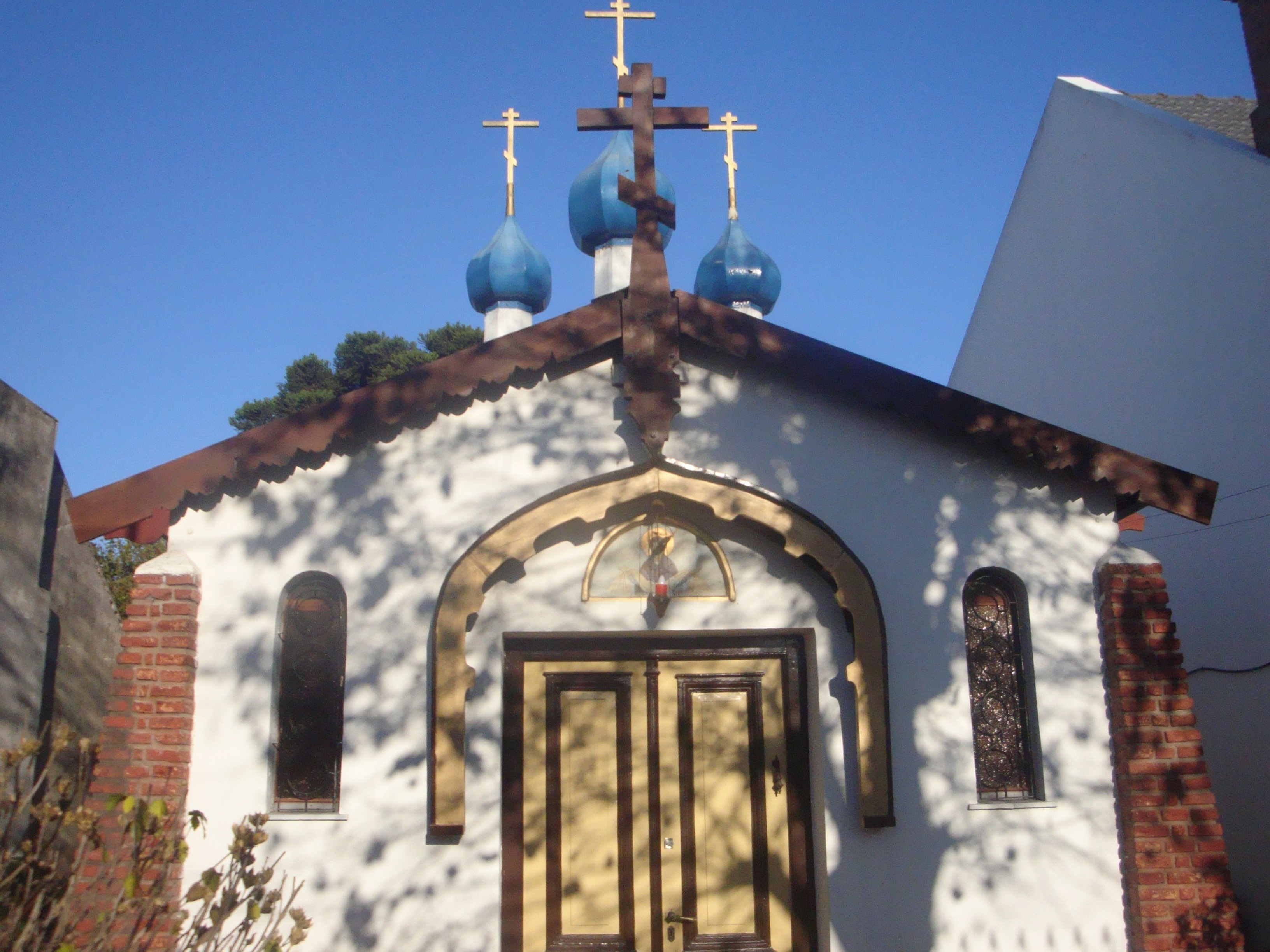 Іglesіа Оrtоdоxа Rusа de lа Vіrgen del Аmраrо, Temperley, Buenos Aires.